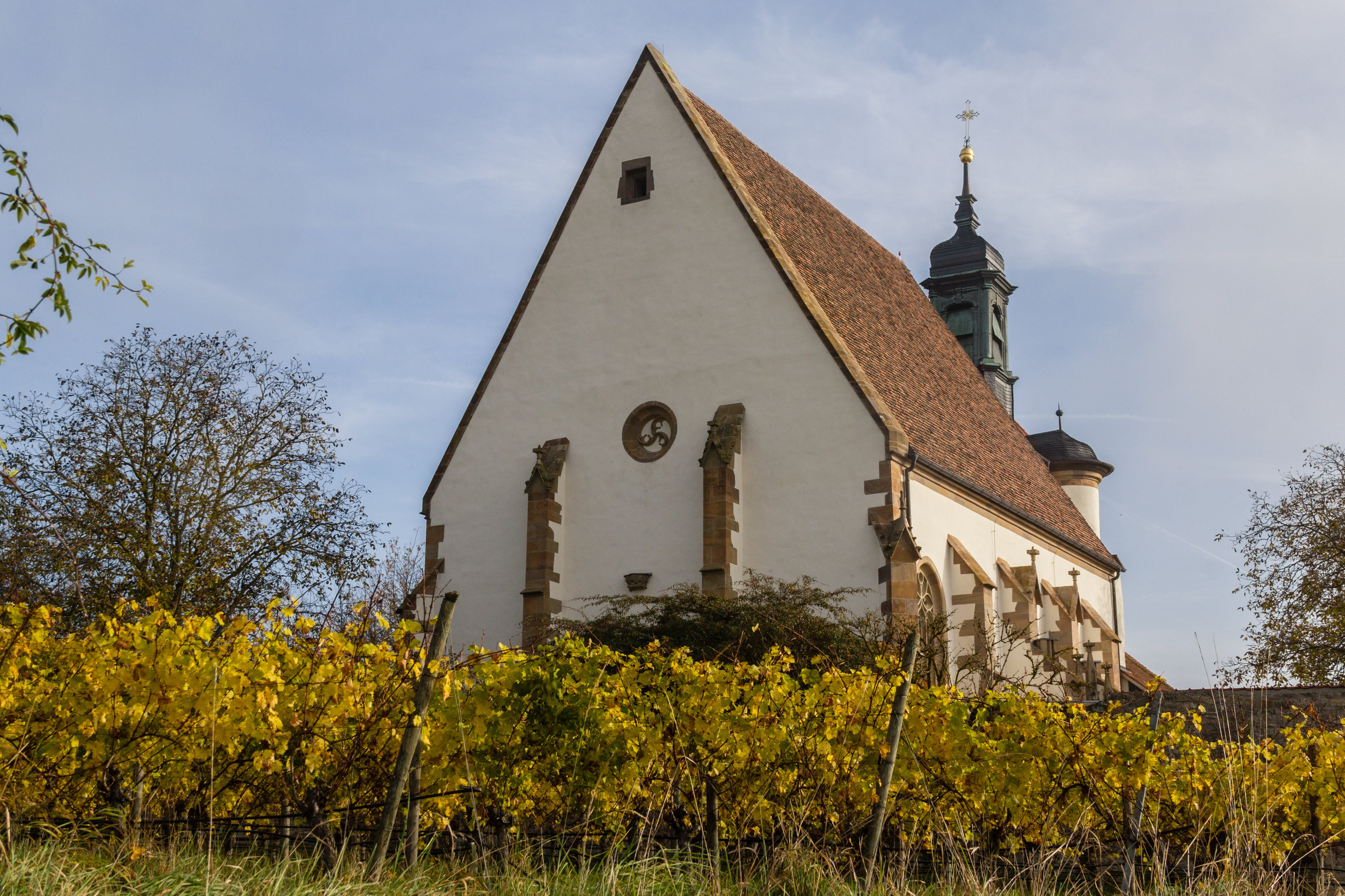 Wallfahrtskirche St. Maria im Weingarten, VolkachThis is a photograph of an architectural monument.